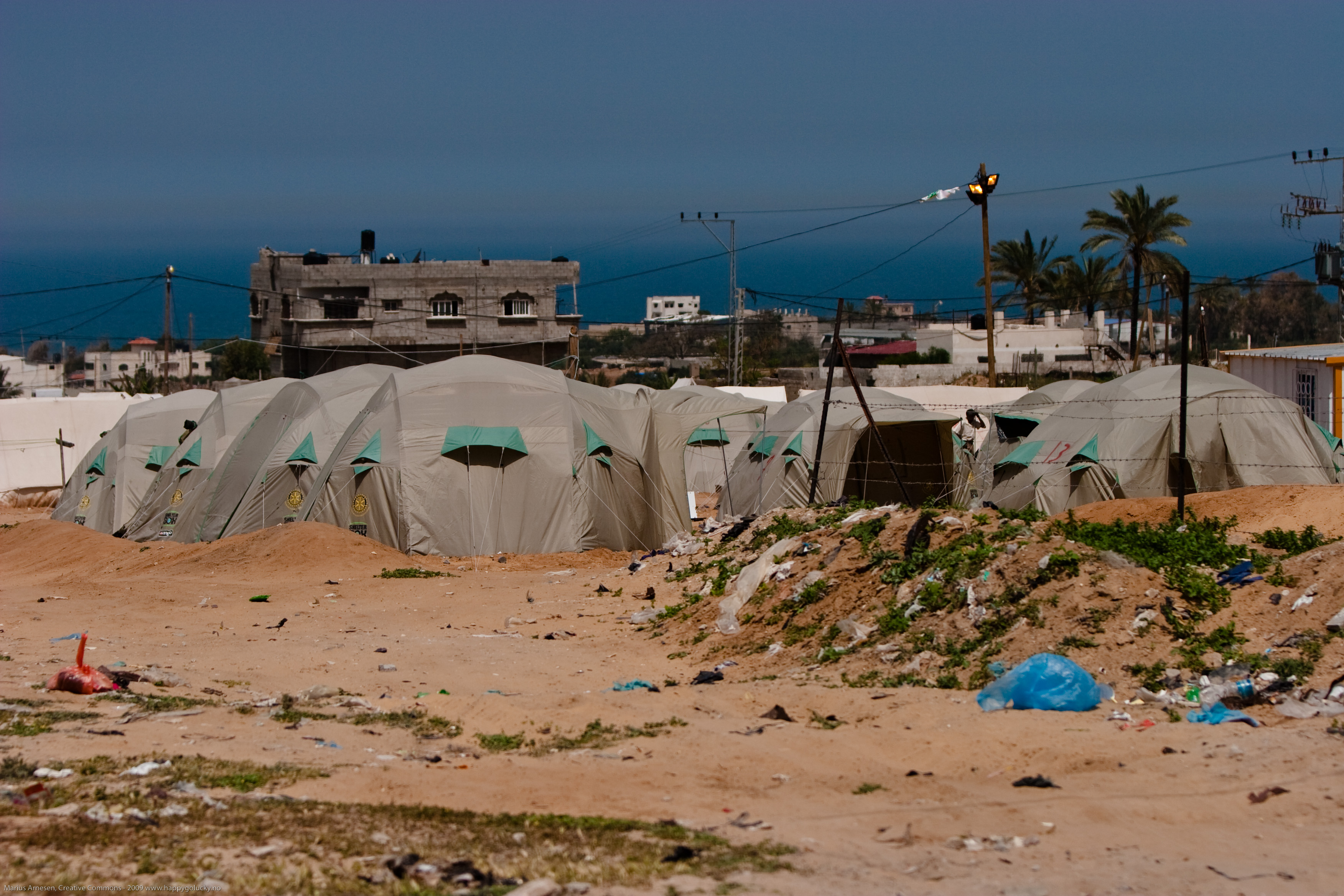 Tent Camp, Gaza Strip